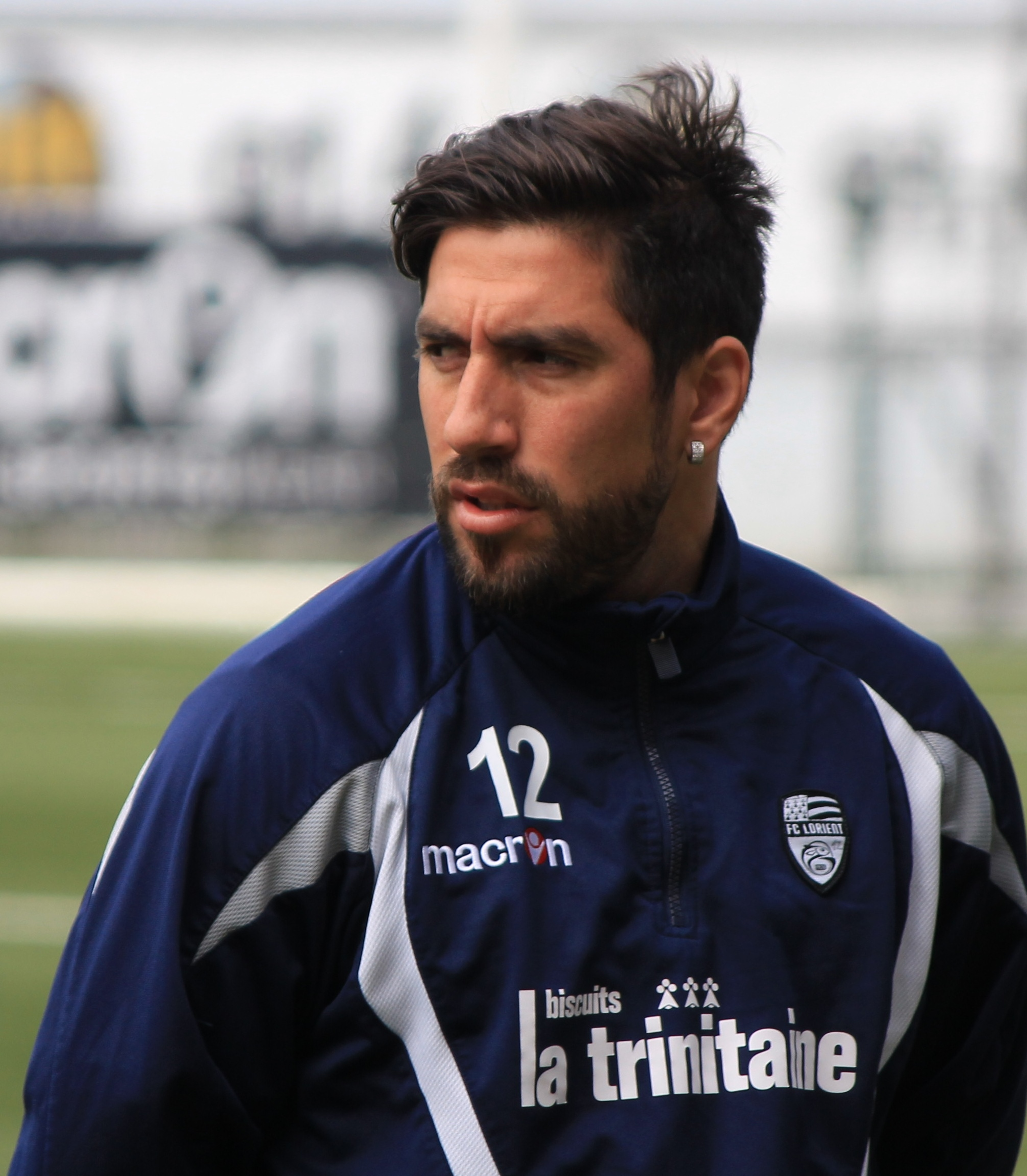 Lucas Mareque pendant un entrainement du FC Lorient le 24 mai 2013